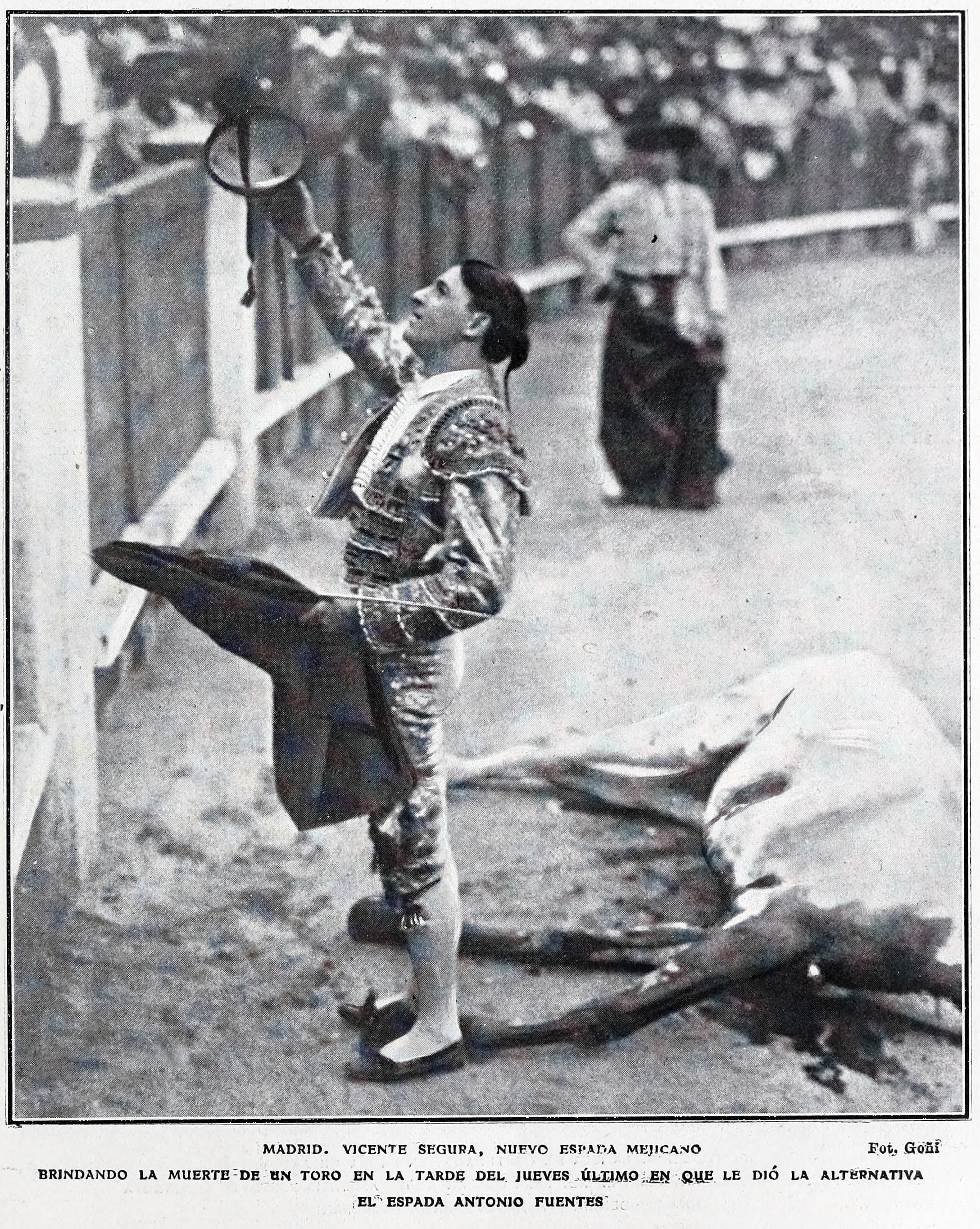 Madrid. Vicente Segura, nuevo espada mejicano. Fot. Goñi. Brindando la muerte de un toro en la tarde del jueves último en que le dió la alternativa el espada Antonio Fuentes